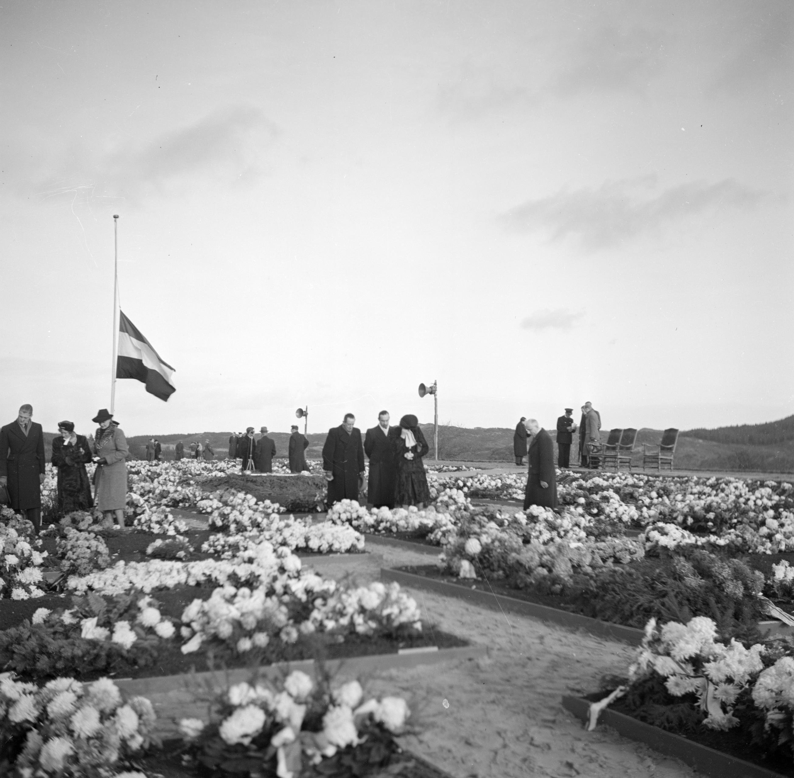 Collectie / Archief : Fotocollectie Van de Poll Reportage / Serie : Begrafenis verzetsstrijders Beschrijving : De erebegraafplaats Bloemendaal in Overveen Annotatie : Op de erebegraafplaats liggen 347 verzetsstrijders begraven. Op 27 november 1945 vond de inwijdingsbijeenkomst plaats in aanwezigheid van koningin Wilhelmina en prins Bernhard Datum : 27 november 1945 Locatie : Noord-Holland, Overveen Trefwoorden : begraafplaatsen Fotograaf : Poll, Willem van de Auteursrechthebbende : Nationaal Archief Materiaalsoort : Negatief (zwart/wit) Nummer archiefinventaris : bekijk toegang 2.24.14.02 Bestanddeelnummer : 255-9111